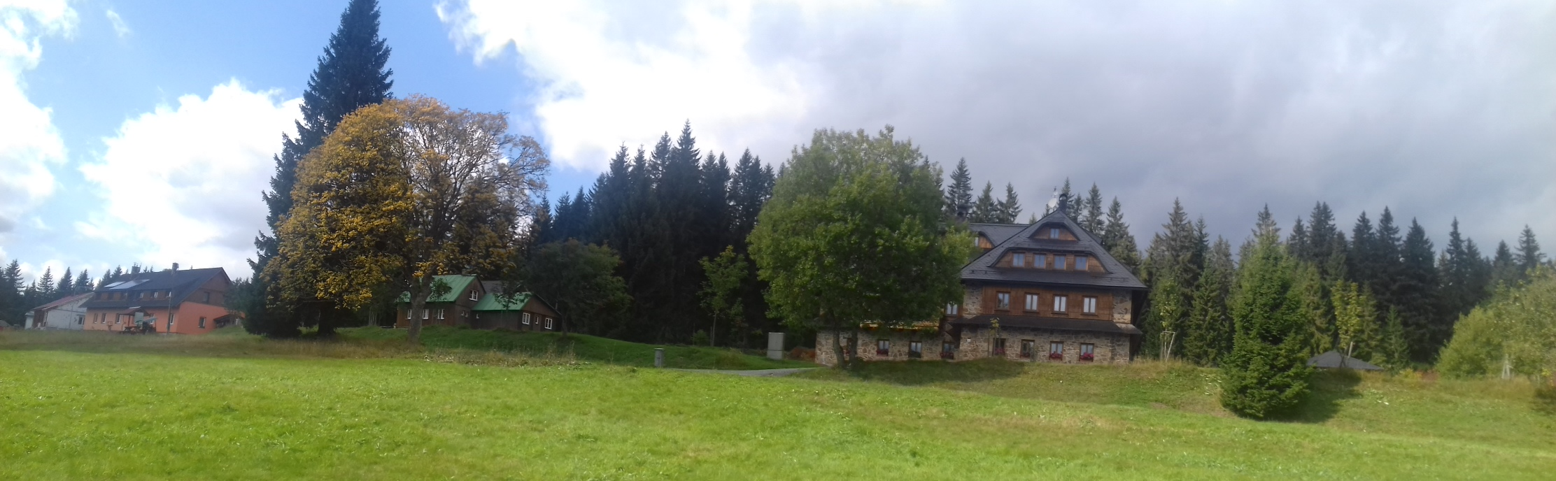 Samota Vchynice-Tetov II, domky nad obcí Modrava, bývalá evidenční část, dnes plně součást Modravy